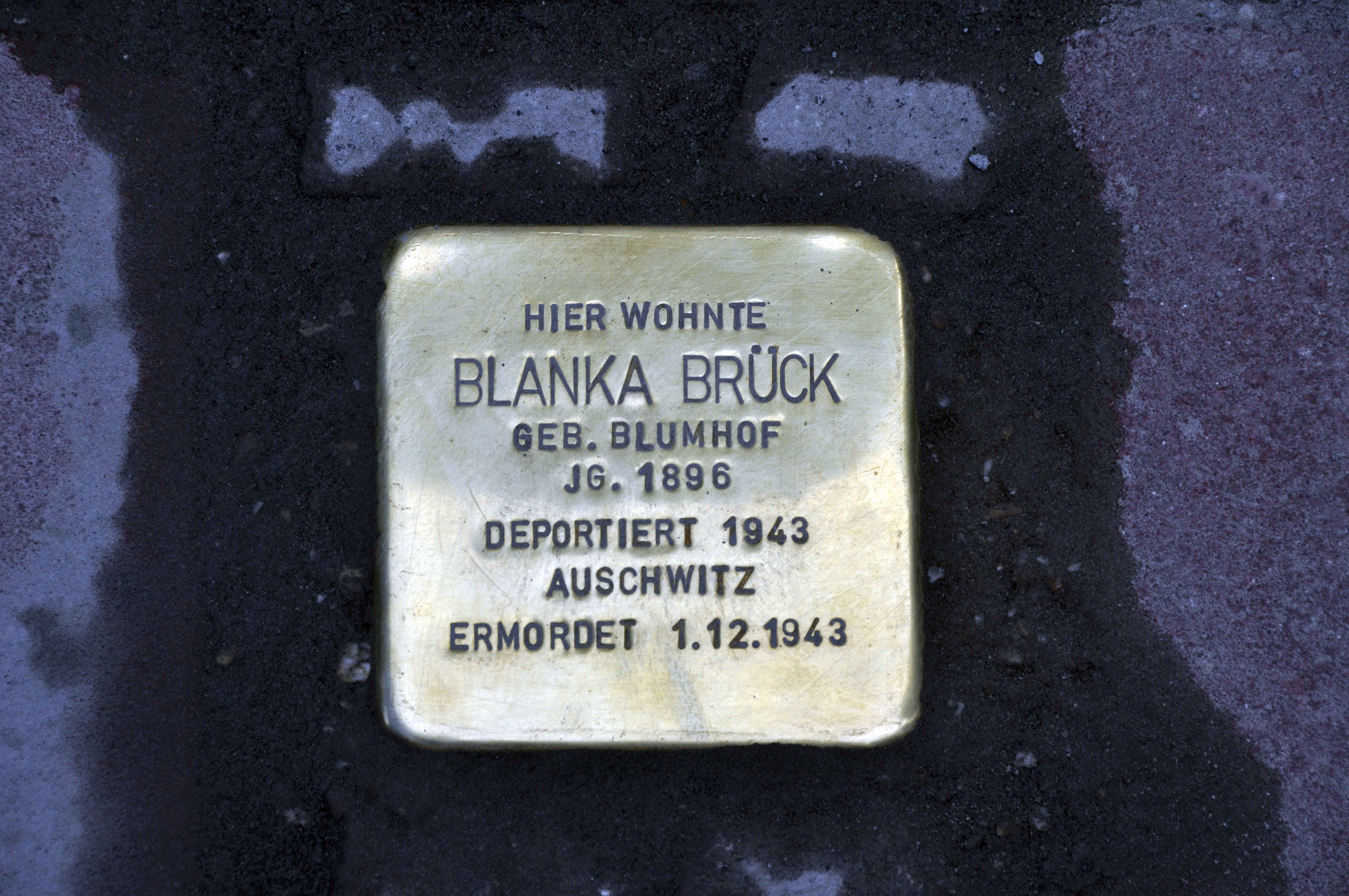 Stolpersteine Merianstr. 39 Brueck, Blanka